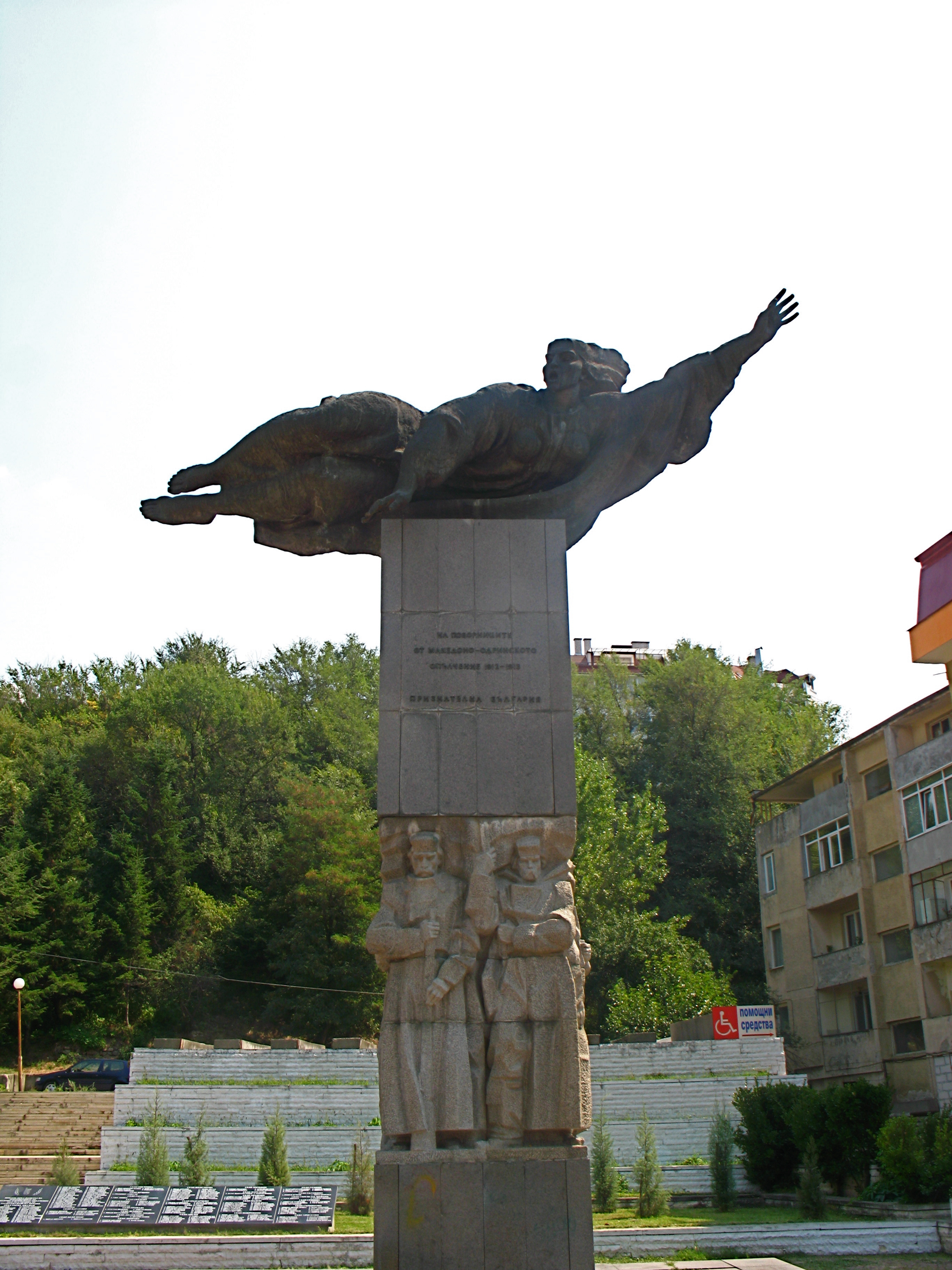 Паметник на Македоно-одринското опълчение в Благоевград, България.